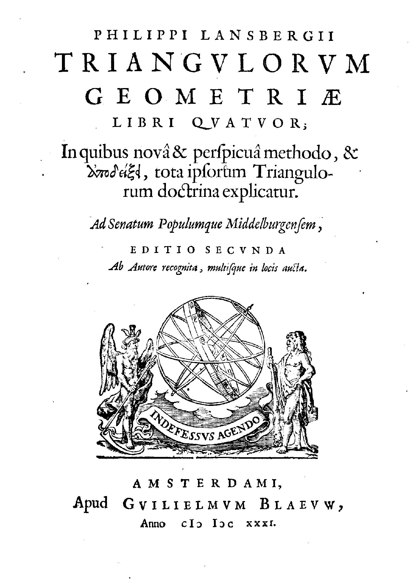 Philippi Lansbergii Triangulorum geometriae libri quatuor; in quibus nova & perspicua methodo, & apodeixei, tota ipsorum triangulorum doctrina explicatur. Ad senatum populumque Middelburgensem, …. - Amsterdami : apud Guiliemum Blaeuw, 1631. - [12], 174, [2] p. : ill. ; 4º .